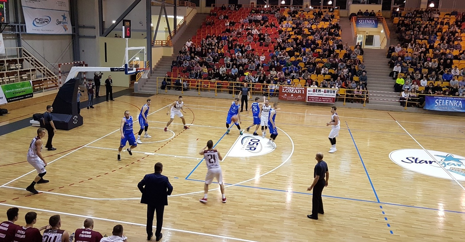 Stargard, 26.11.2017. Mecz Spójni z Pogonią Prudnik